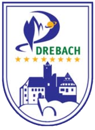 blazono de la komunumo Drebach